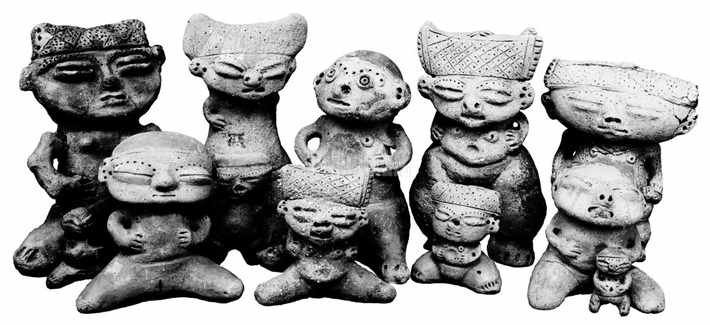 Idolos indígenas hallados en el Archipiélago de Los Roques